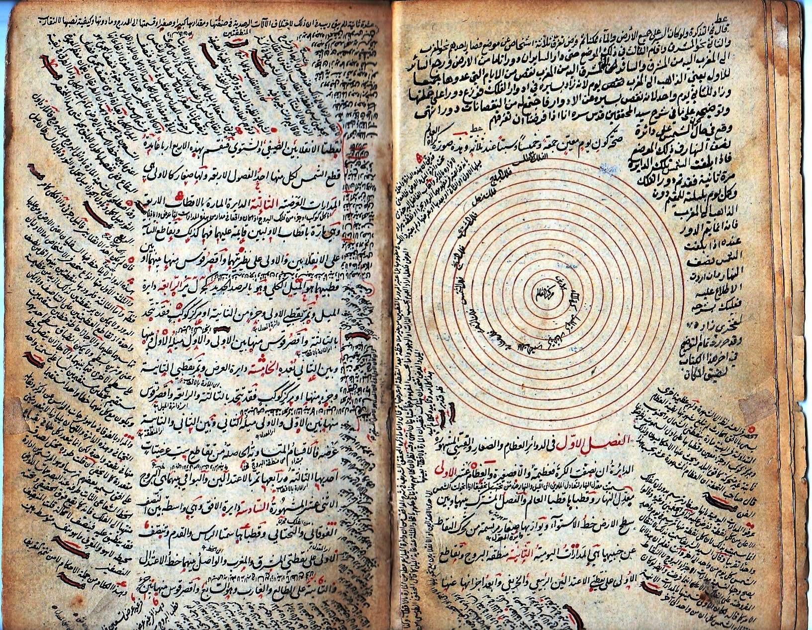 صفحة من كتاب (تشريح الأفلاك) في علم الهيئة، من تأليف بهاء الدين العاملي وعلى غلاف الكتاب ختم واهداء الشيخ نعمان خير الدين الآلوسي إلى استاذهِ وشيخه ملا قاسم أفندي المفتي عام 1273هجري/ 1856م، في بغداد